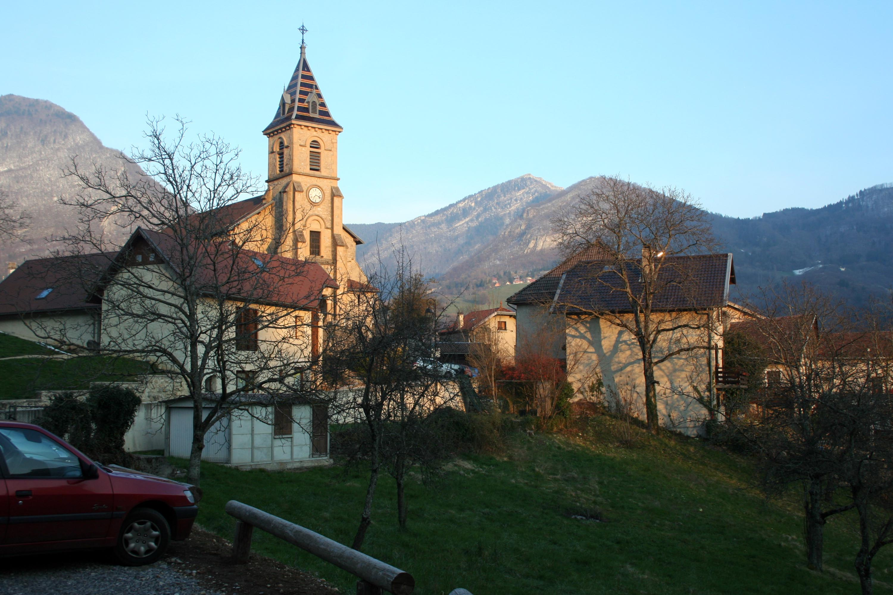 Quaix-en-Chartreuse (Isère)